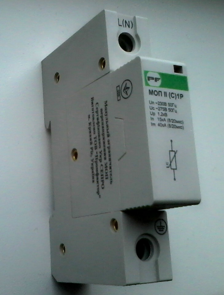 Знято мобілкою Самсунг